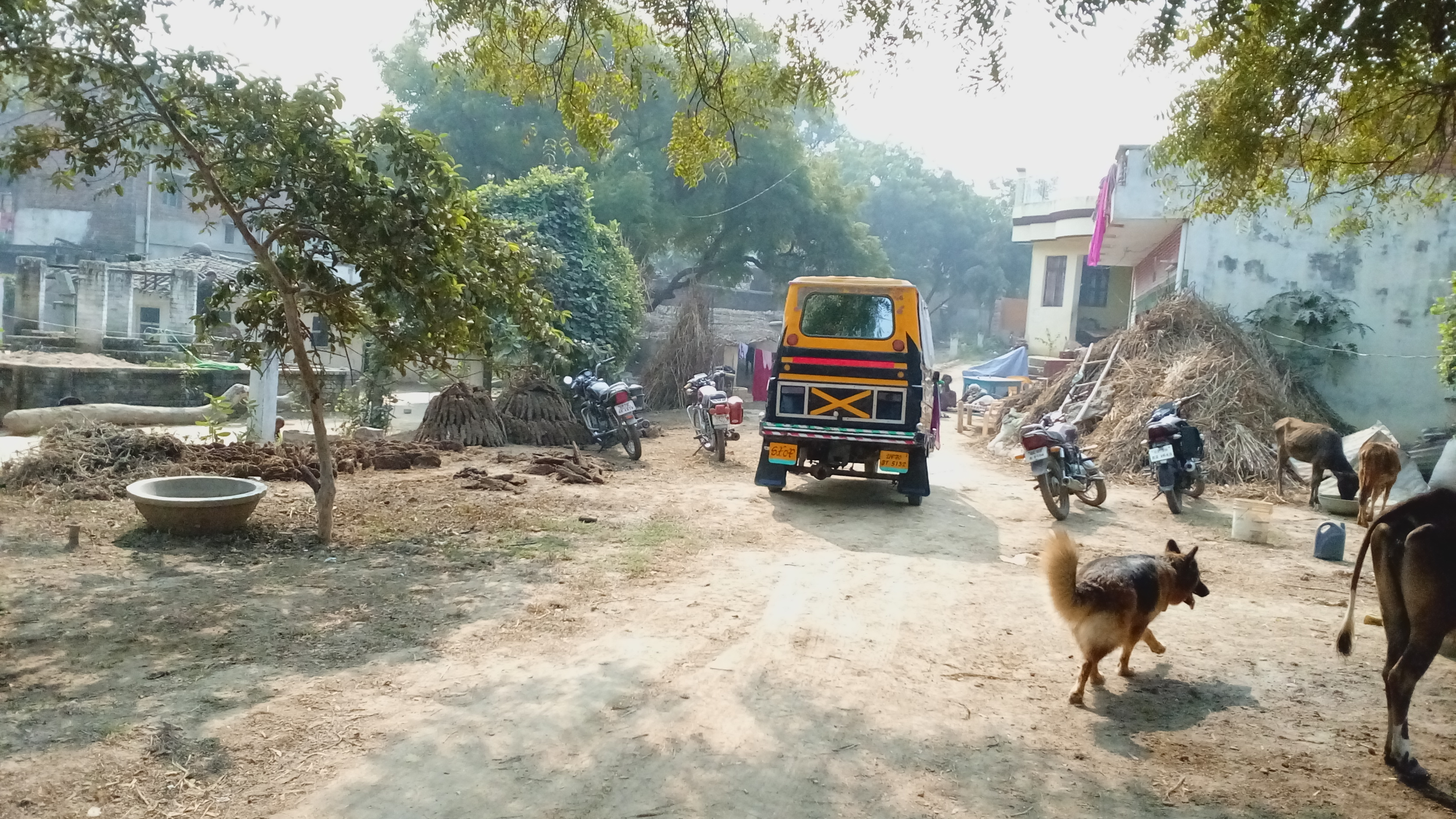 गाँव का एक दृश्य